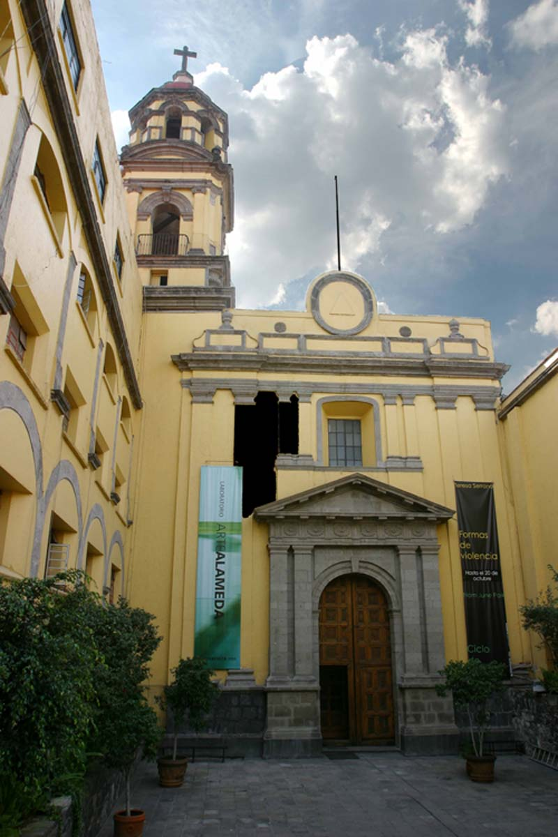 The Laboratorio Arte Alameda (LAA) was founded in Mexico City in November, 2000 by the National Council for the Culture and the Arts (CONACULTA) through the National Institute of Fine Arts (INBA)